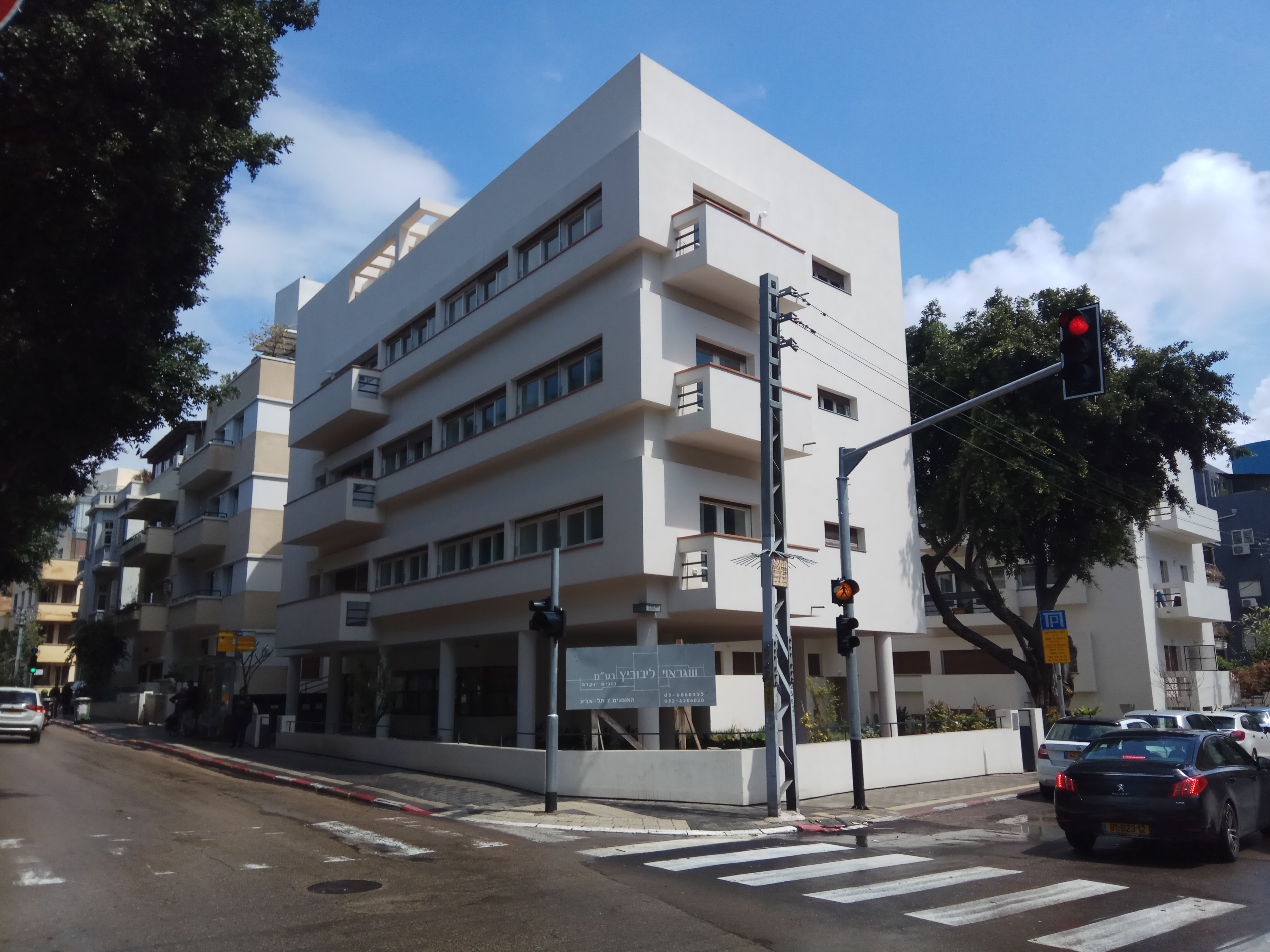 בית אנגל בשדרות רוטשילד 84 בתל אביב